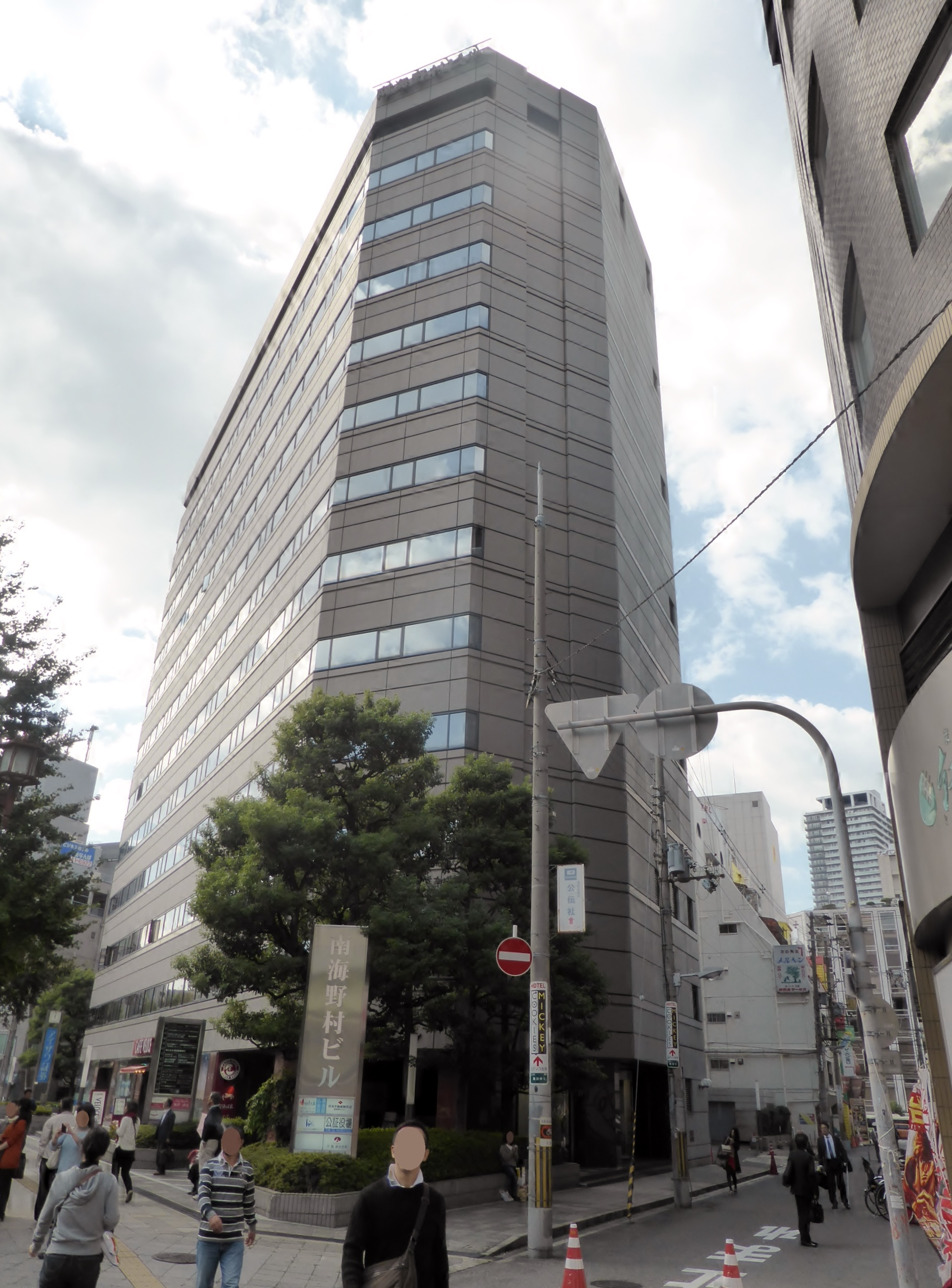 南海野村ビルを撮影。